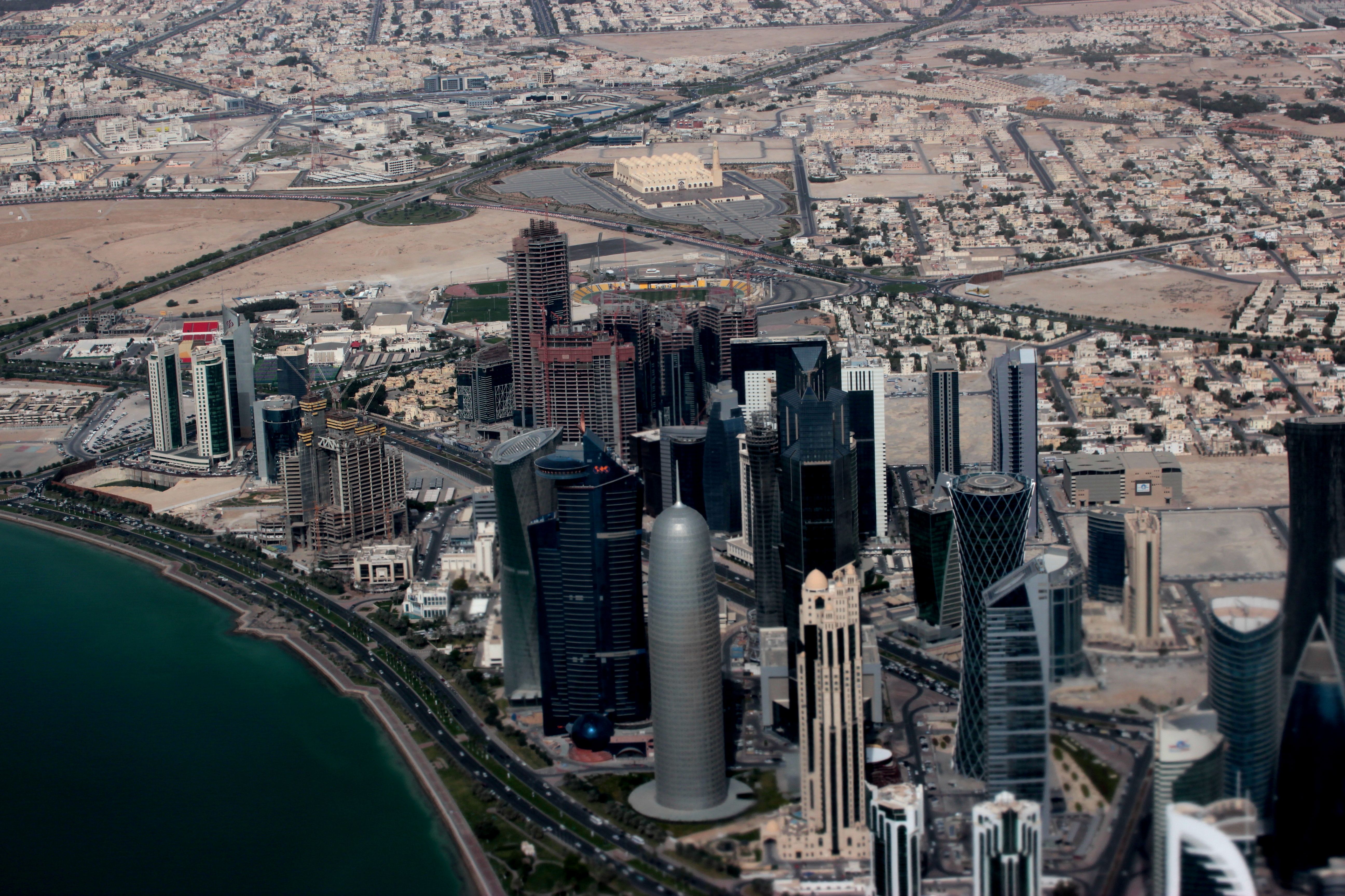 Doha